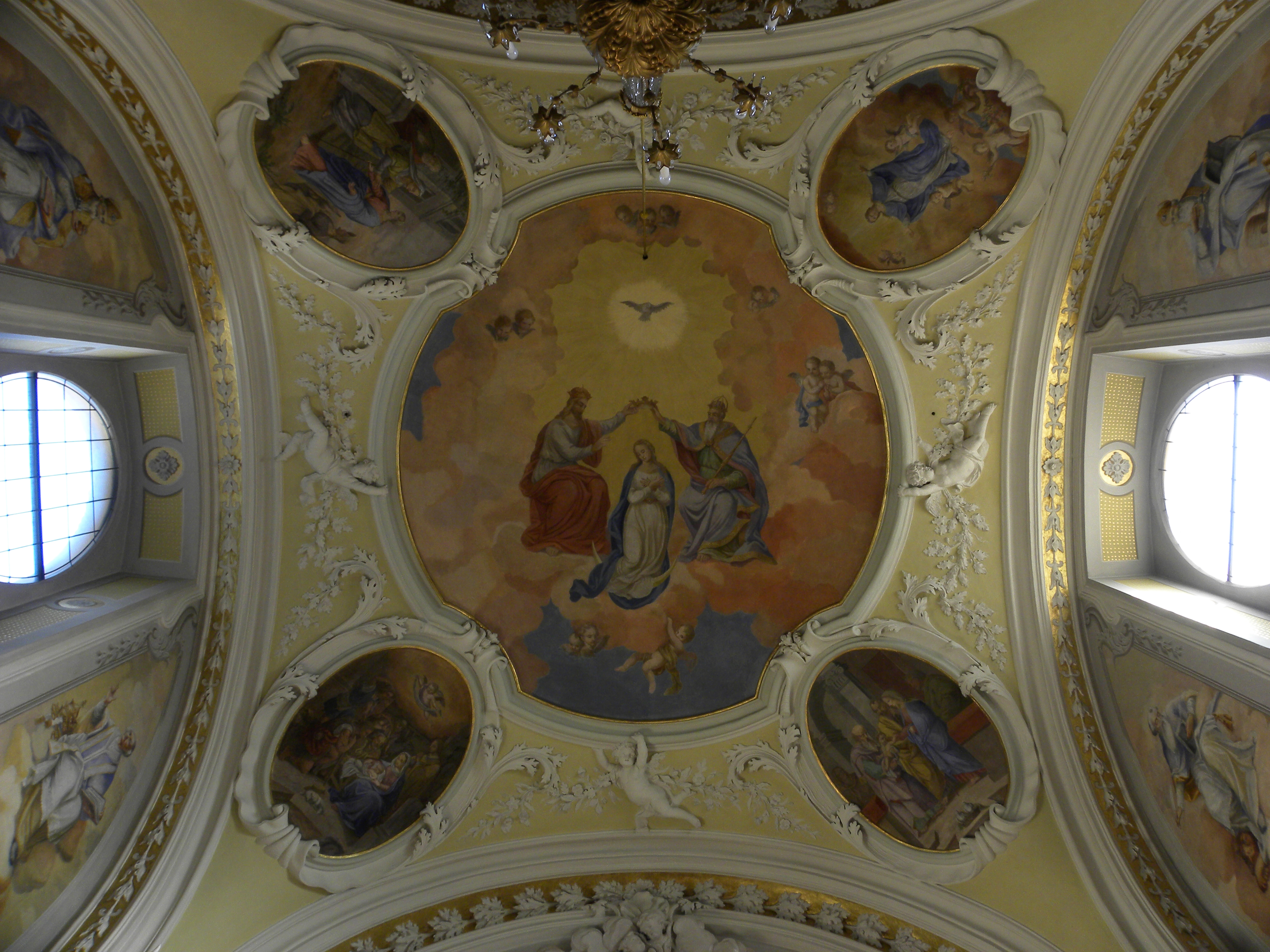 Die Deckenmalerei in der Marienkapelle stammt aus dem Jahr 1902 und wurde von Rupert Lorenz angefertigt.